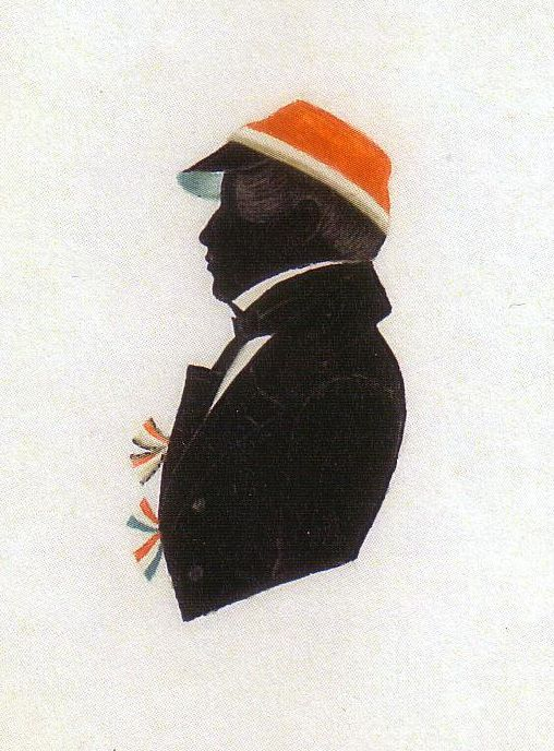 Silhouette von Fridolin Thiel (1824-1859) als Angehörigem der Corps Marchia Berlin und Masovia Königsberg. Thiel war zuletzt Staatsanwalt in Heilsberg, Ostpreußen.